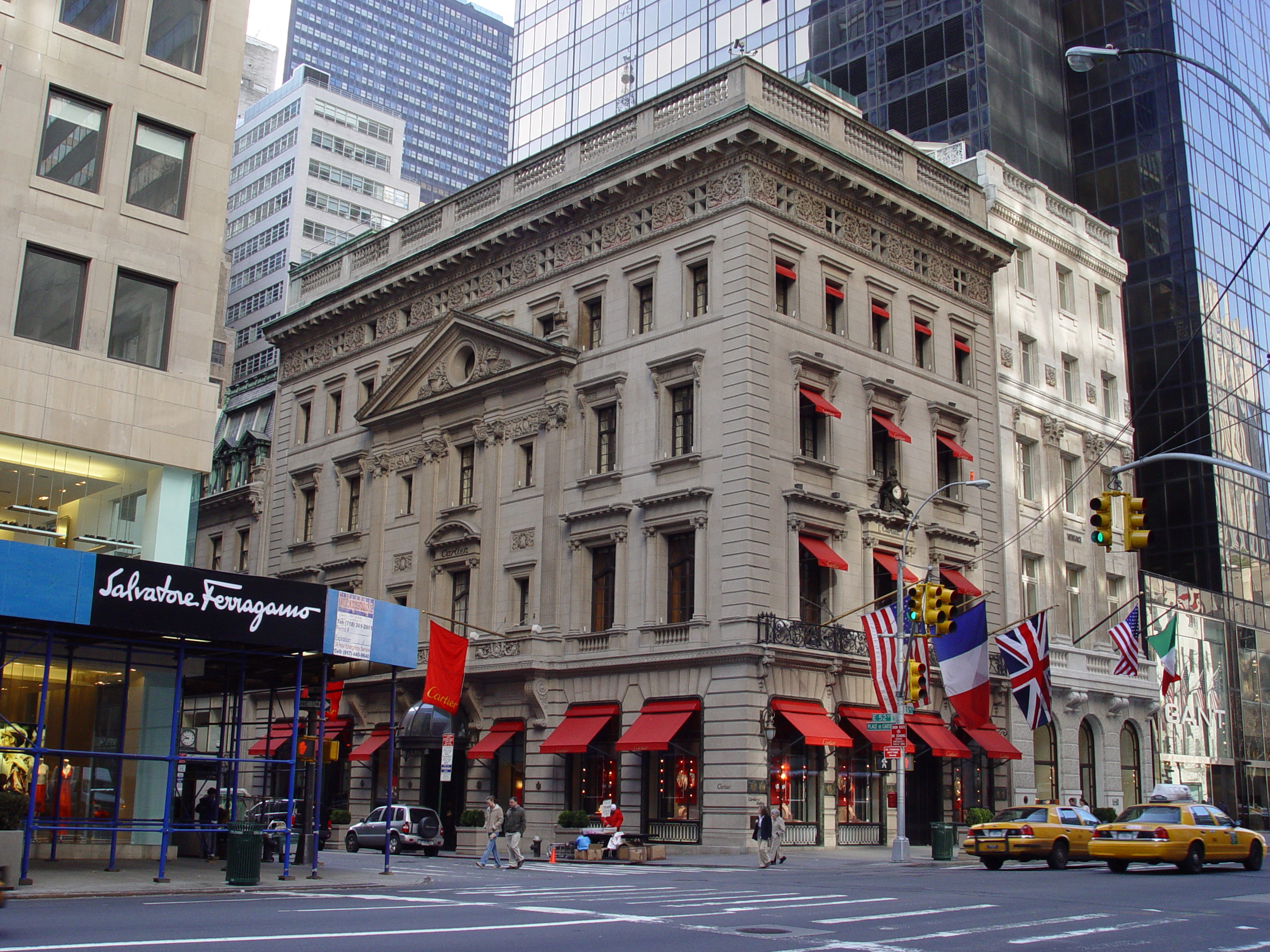 Fotografiert von Martin Dürrschnabel Das Gebäude von Cartier in New York City